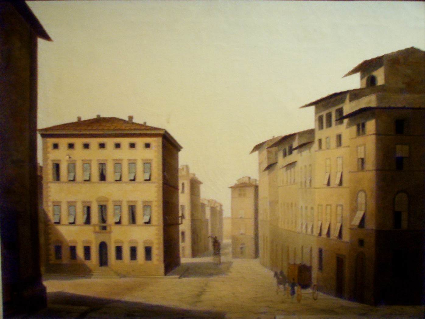 Fabio borbottoni, 1820-1902, canto dei carnesecchi